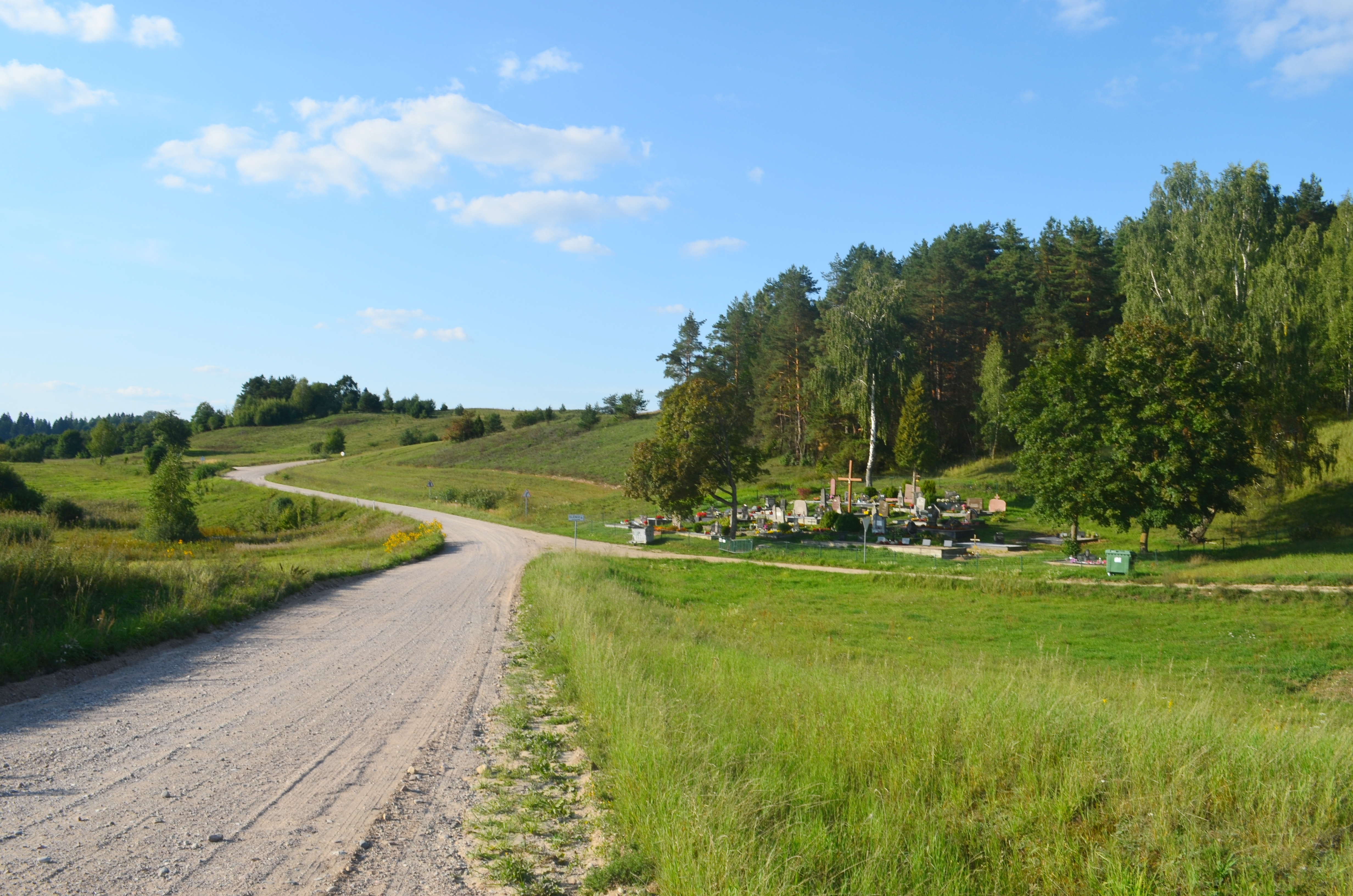 Kozelkiškių kapinės, Trakų raj.